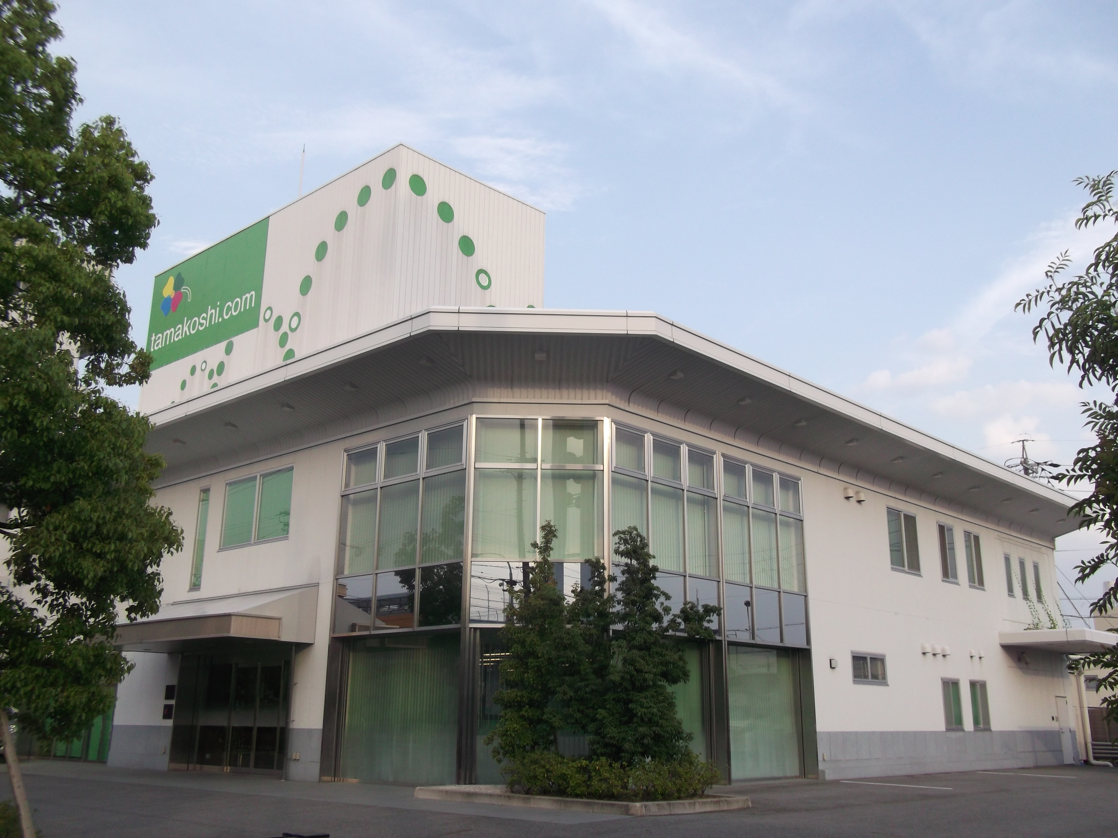 名古屋市守山区白山の玉越本社を北側公道西側より撮影